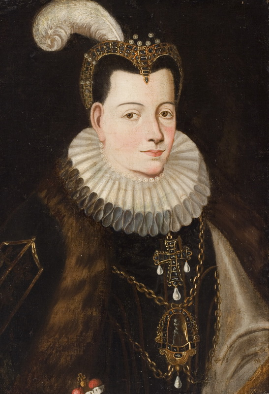 Беларуская (тарашкевіца): Партрэт Ганны Радзівіл (Hanna Radzivił) з Кетлераў (Kettler). Зь Нясьвіскай партрэтнай галерэі